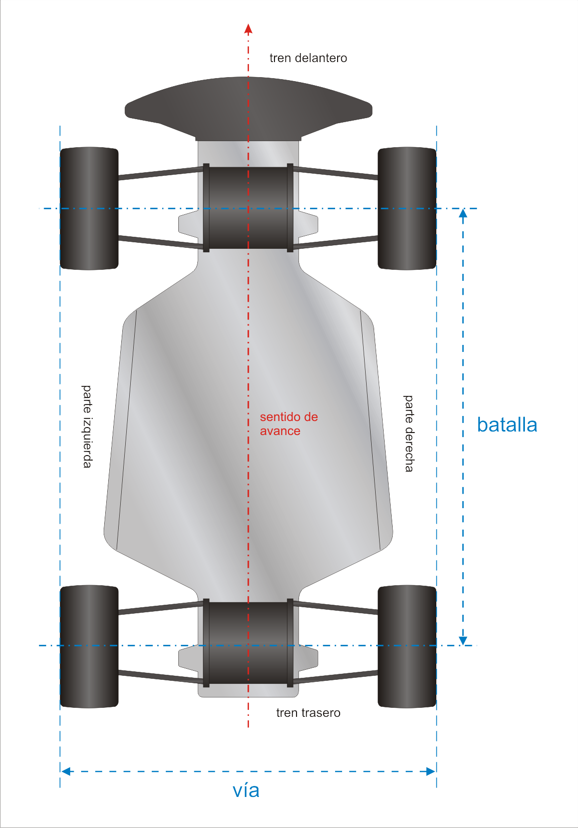 Gráfico de las medidas de ejes de un automodelo: batalla y vía.